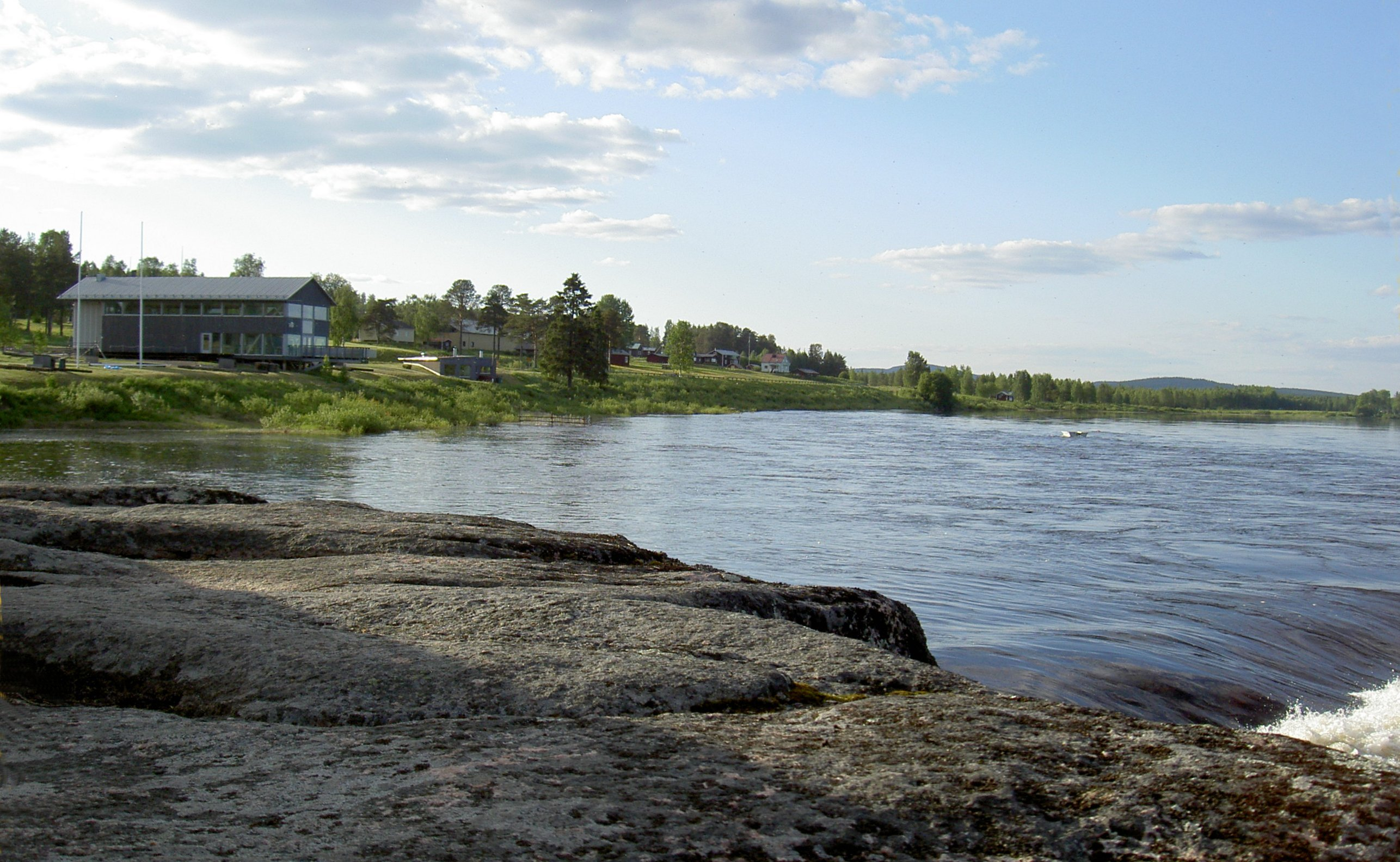 Niskanpää vid Torne älv i Övertorneå kommun